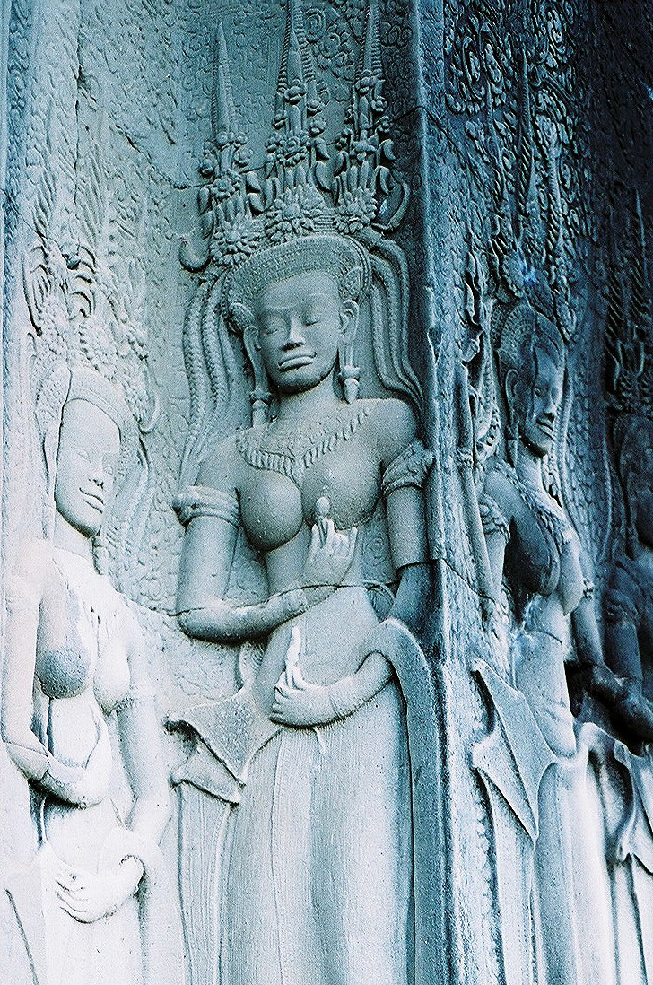 吴哥窟游廊仙女浮雕